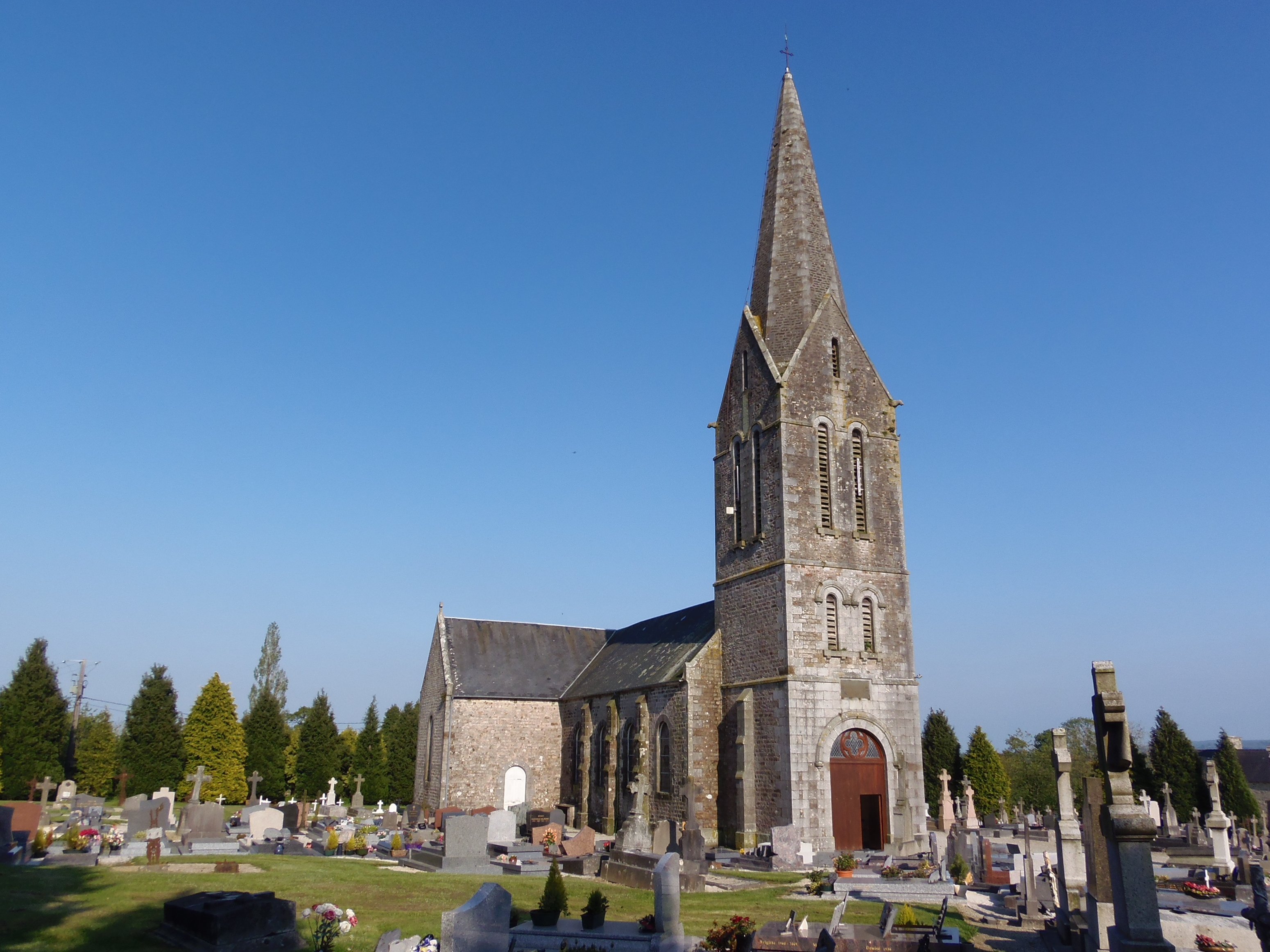 Montbray (Normandie, France). L'église Saint-Martin.